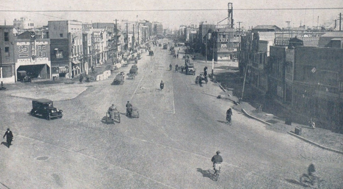 浅草橋付近から浜町 金座通りを望む。架空線は地下に整理されている